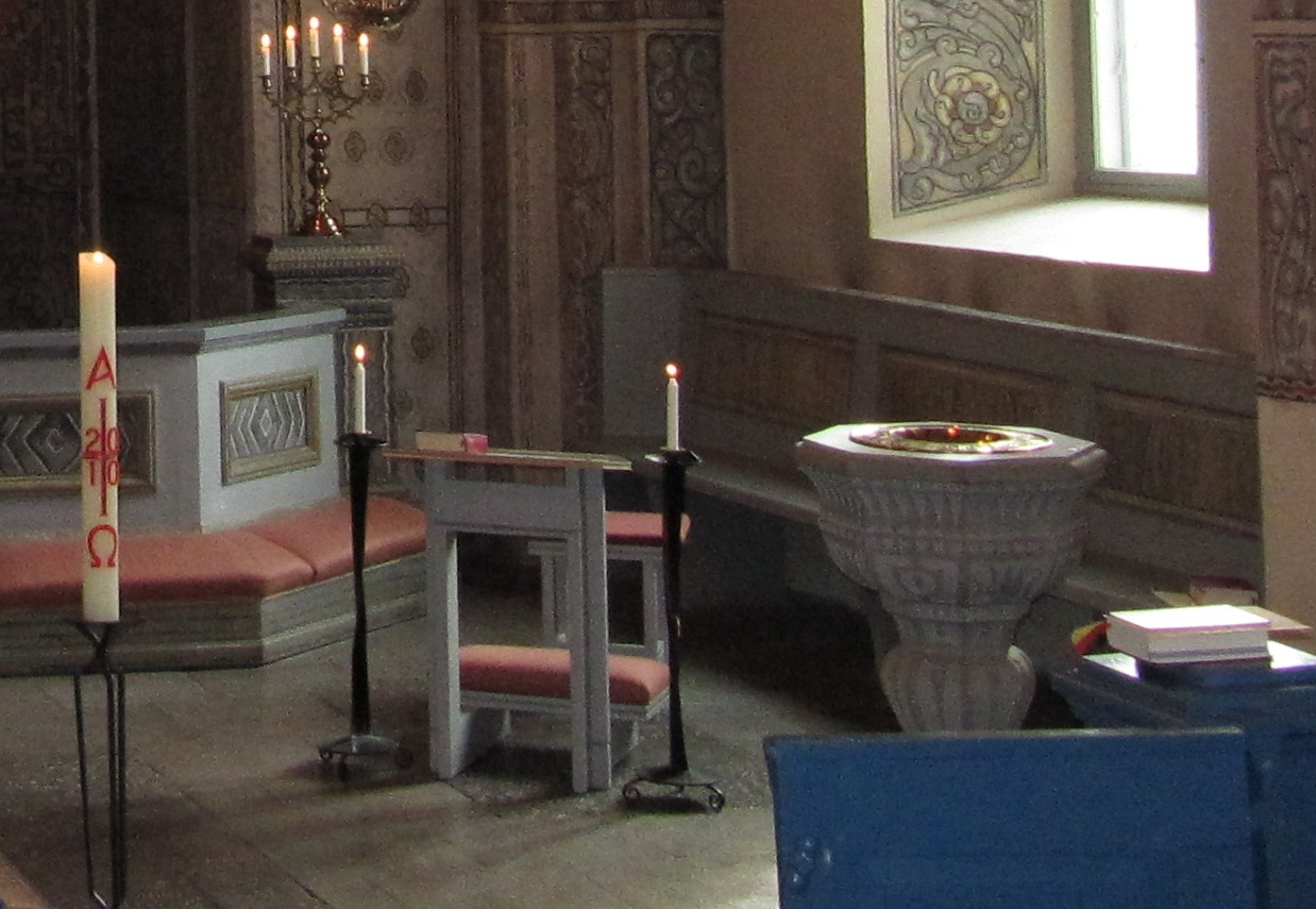 A free-standing sedilia with desk in Alsike kyrka, Knivsta, Sweden